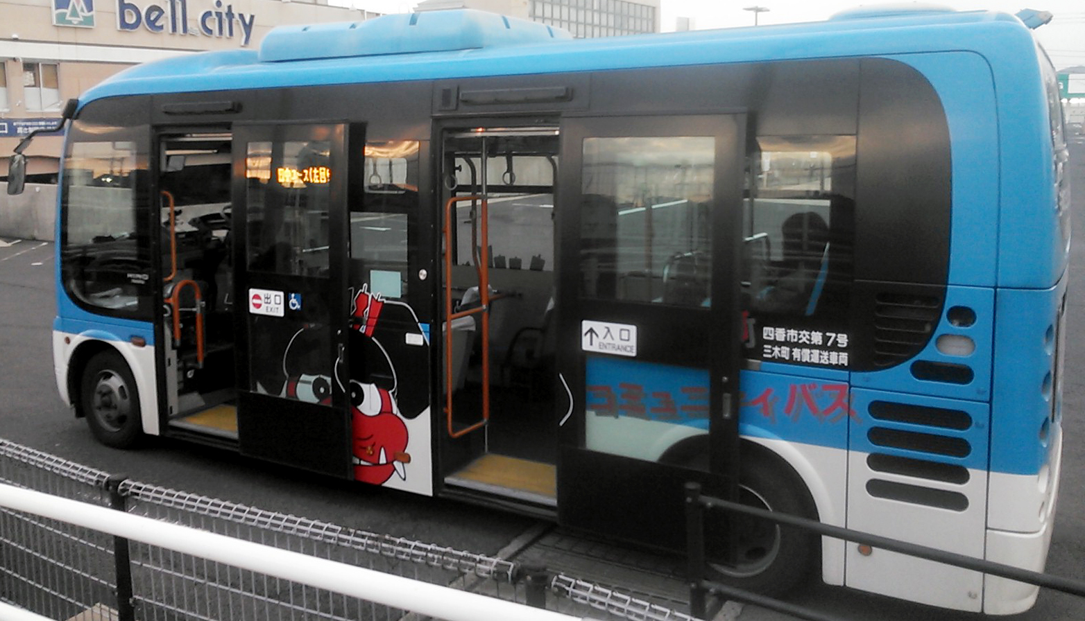 三木町コミュニティバス1号車前左側乗降口面。学園通り駅バス停にて投稿者自身による撮影。